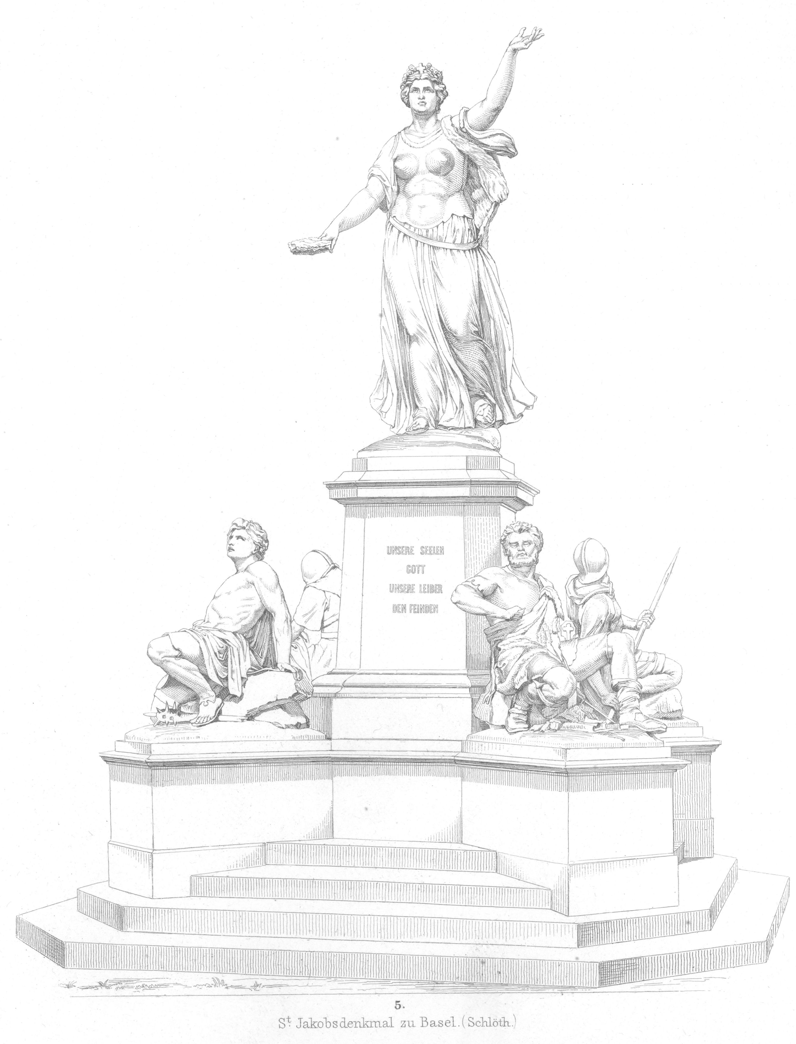 St. Jakobs-Denkmal in Basel, Marmor, 1871 von Ferdinand Schlöth (1818-1891)